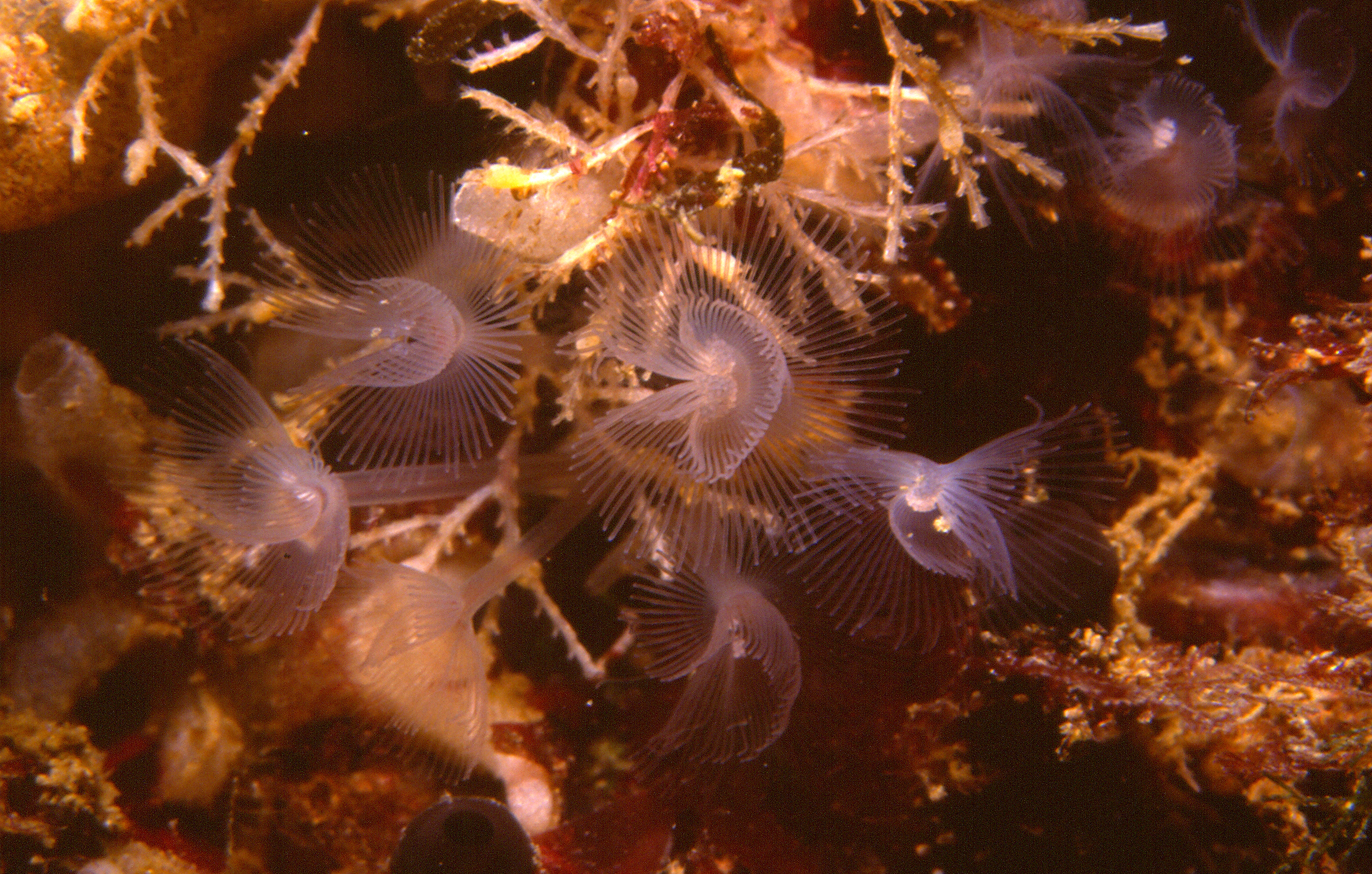 Phoronis hippocrepia Wright, 1856 - Banyuls-sur-Mer : 07/90